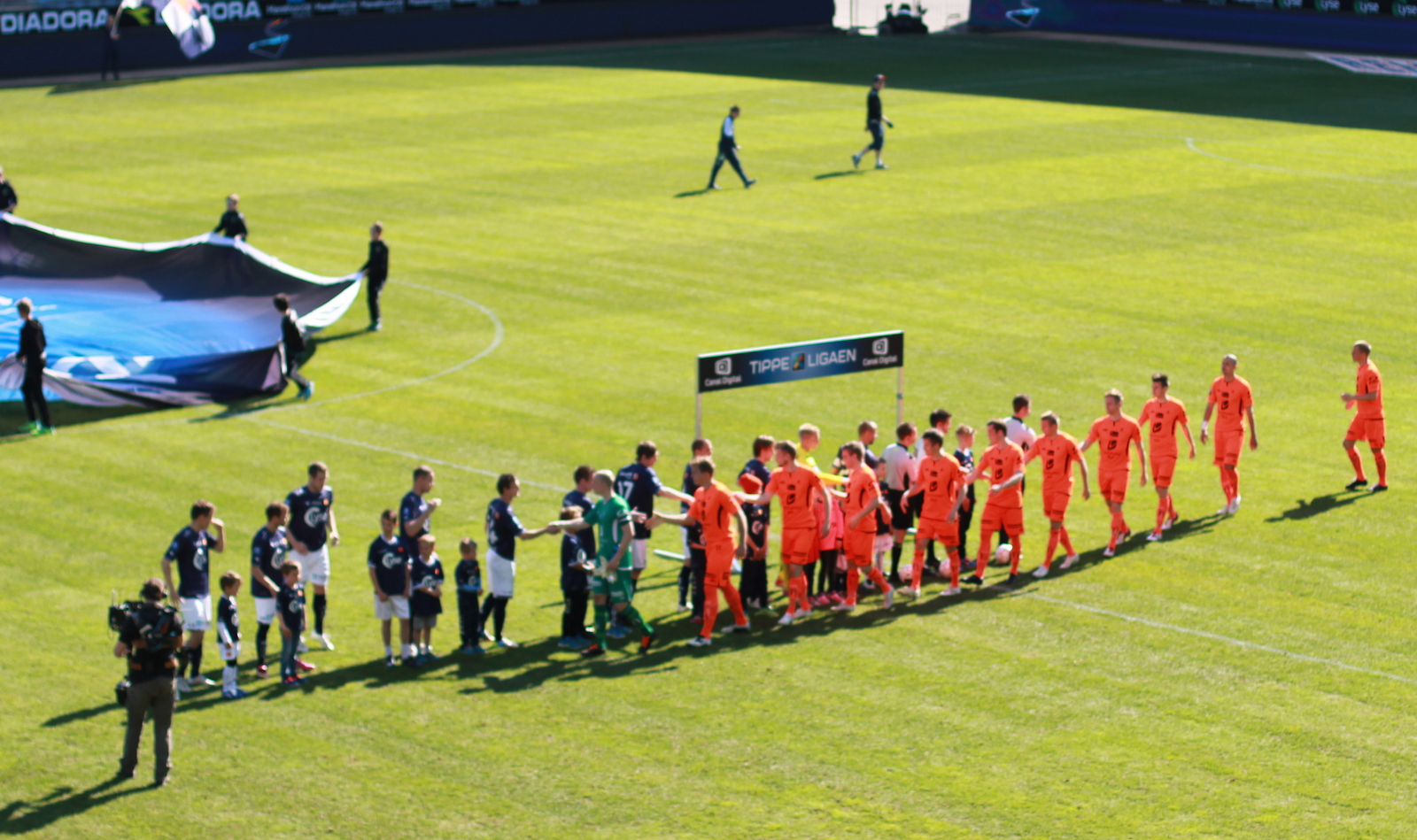 Foran Tippeligakampen Viking-Haugesund